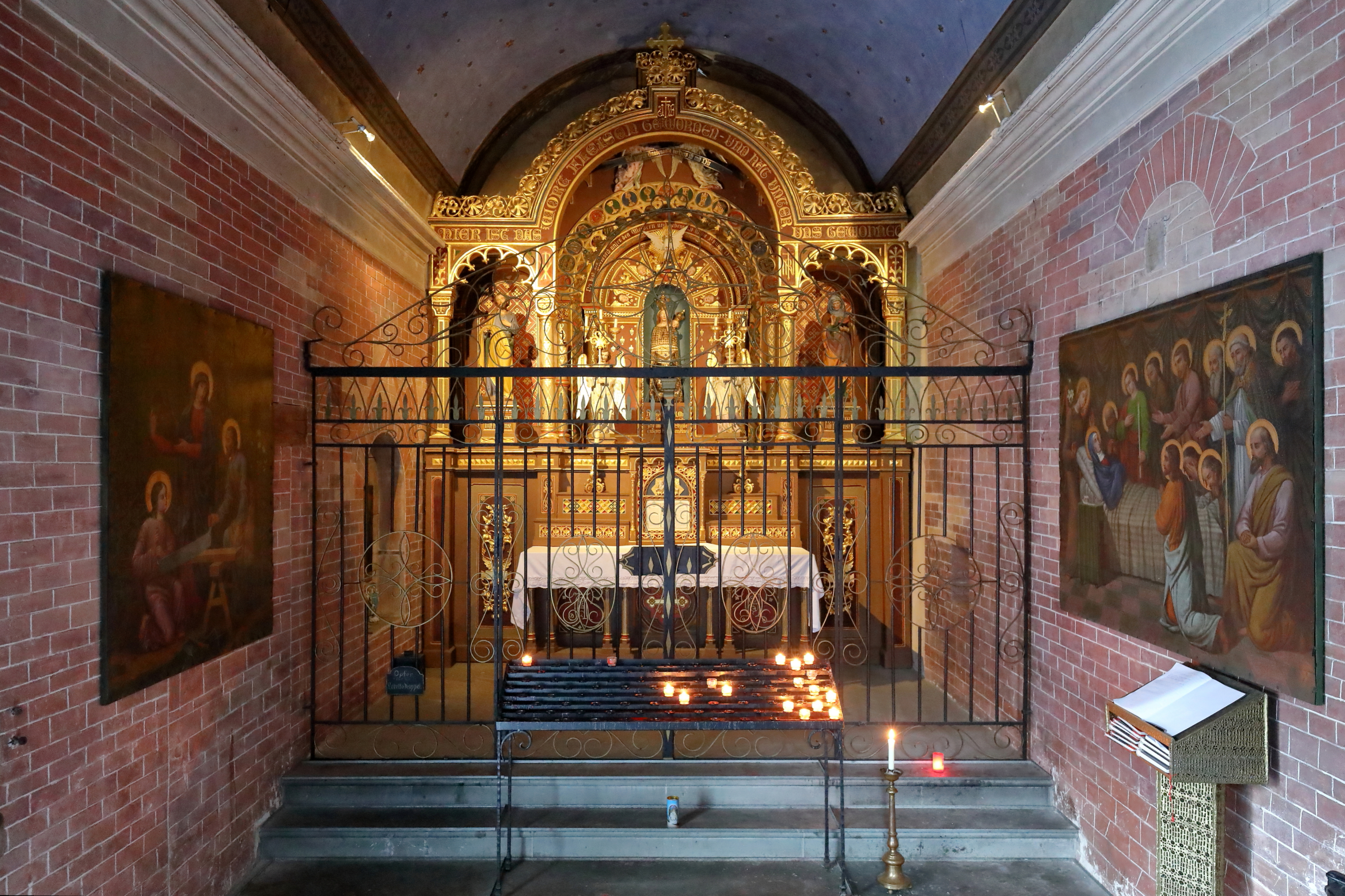 Innenansicht der Loretokapelle nächst der Pfarr- und Wallfahrtskirche Zum göttlichen Christuskind in Christkindl, ein Ortsteil der oberösterreichischen Stadt Steyr.Die Kapelle, eine Nachbildung des Heiligen Hauses von Nazareth, wurde 1876 nach einem Entwurf und unter Leitung des Steyrer Kunsttischlers Johann Jaunisch errichtet und am 29. Juni 1876 vom Linzer Bischof Franz Josef Rudigier geweiht.